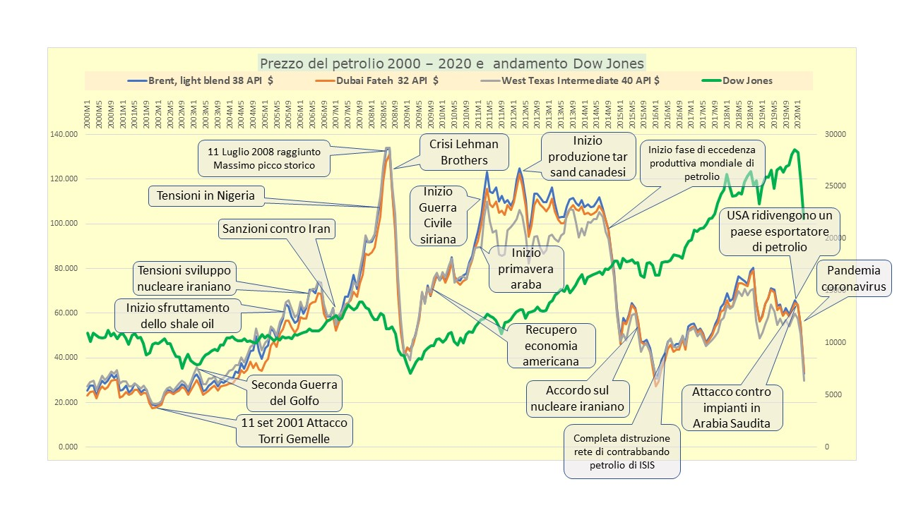 Andamento cronologico dei prezzi del petrolio (Brent, WTI, Dubai Fateh) negli anni 2000 - 2020 , dell'indice Dow Jones e dei principali eventi geopolitici che l'hanno influenzato